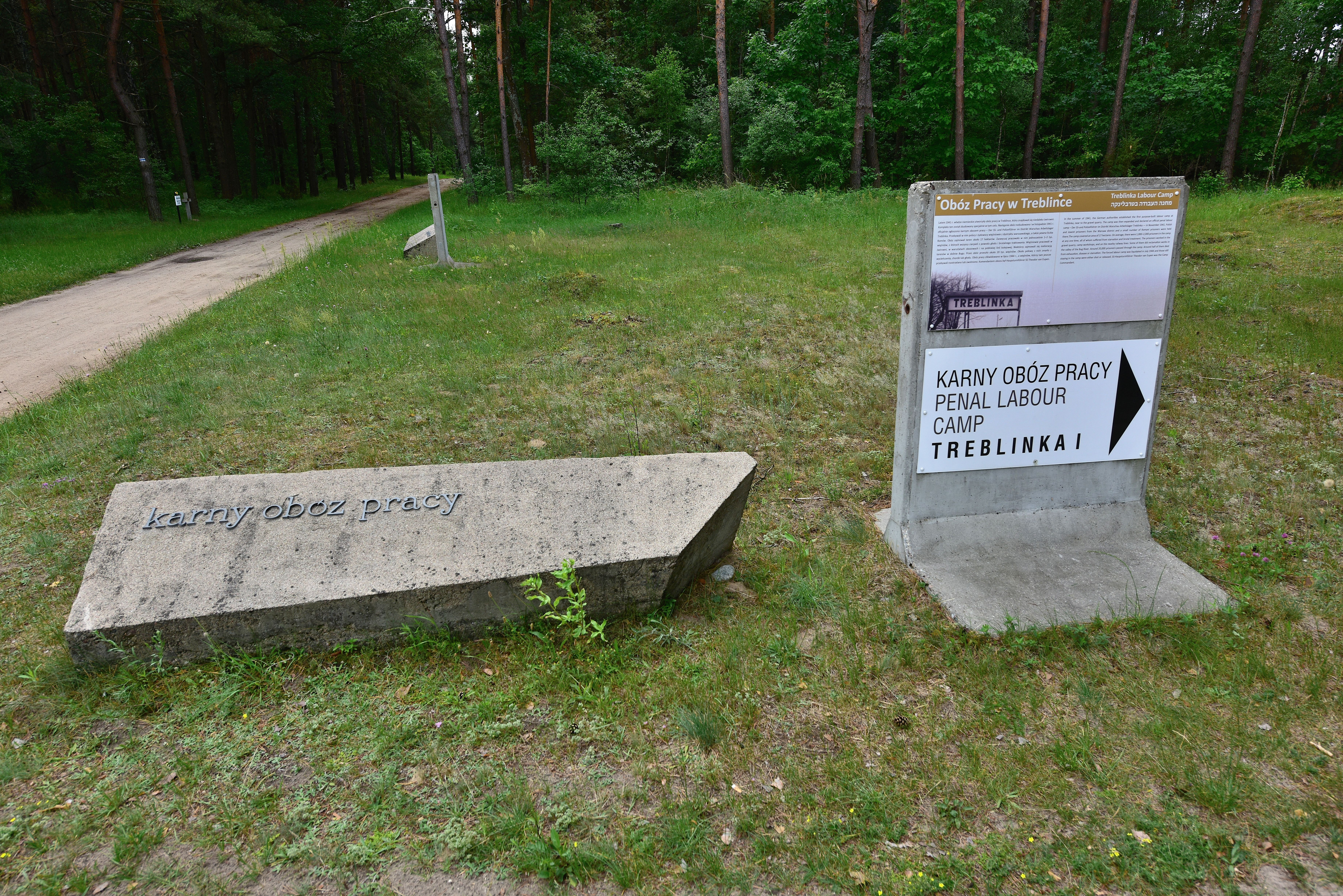 Karny obóz pracy w Treblince. Oznaczenia prowadzące do obozu